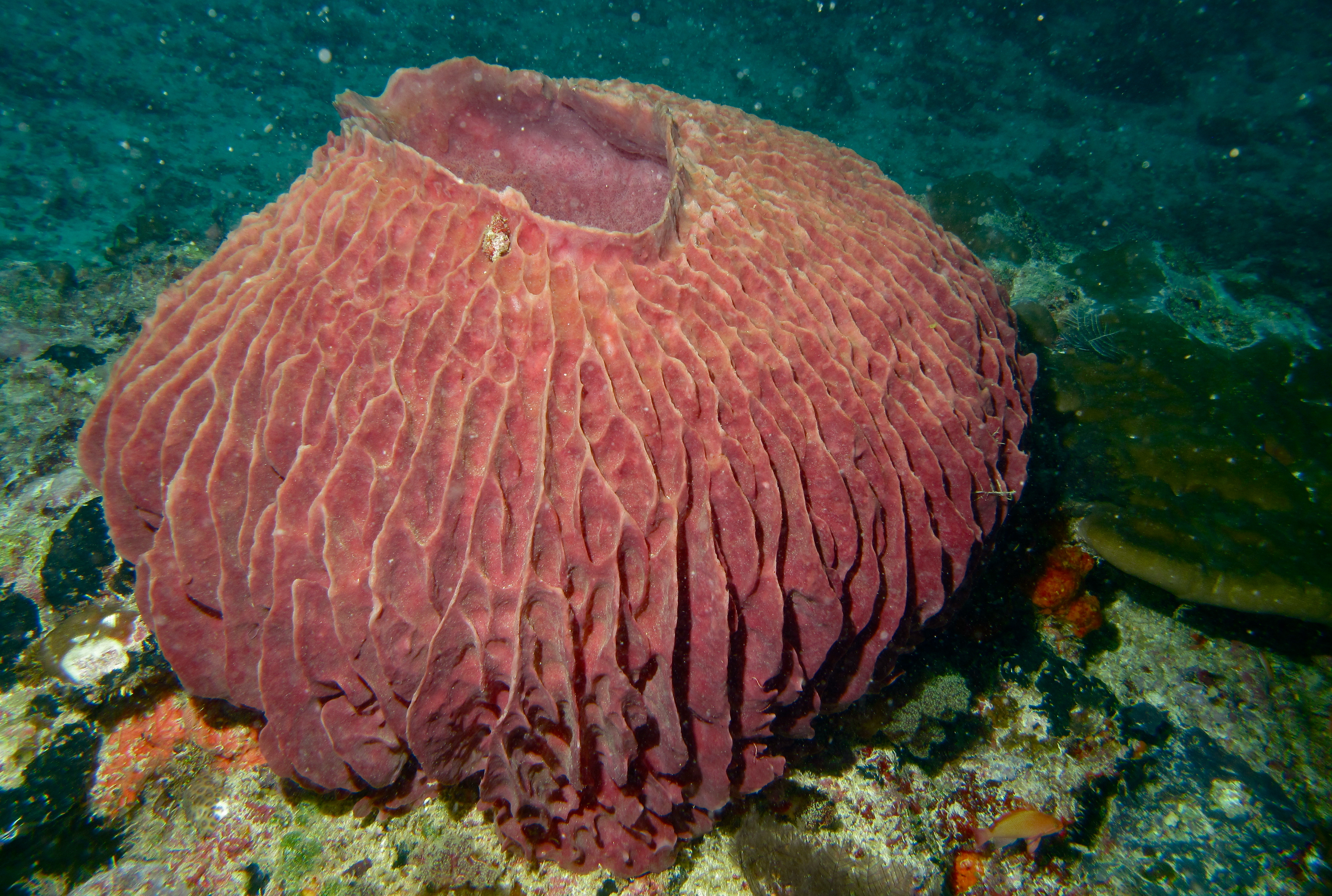 Barracuda Point, Sipadan, Sabah, MALAYSIA